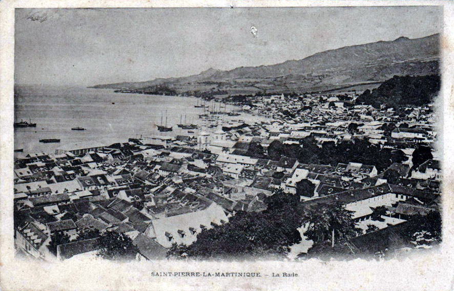 La rade de Saint-Pierre de la Martinique